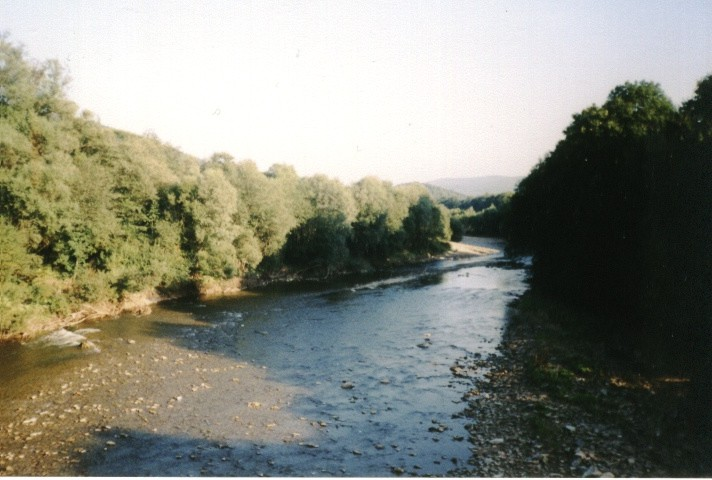 Skawa River, Poland, near Makow Podhalanski, 2001